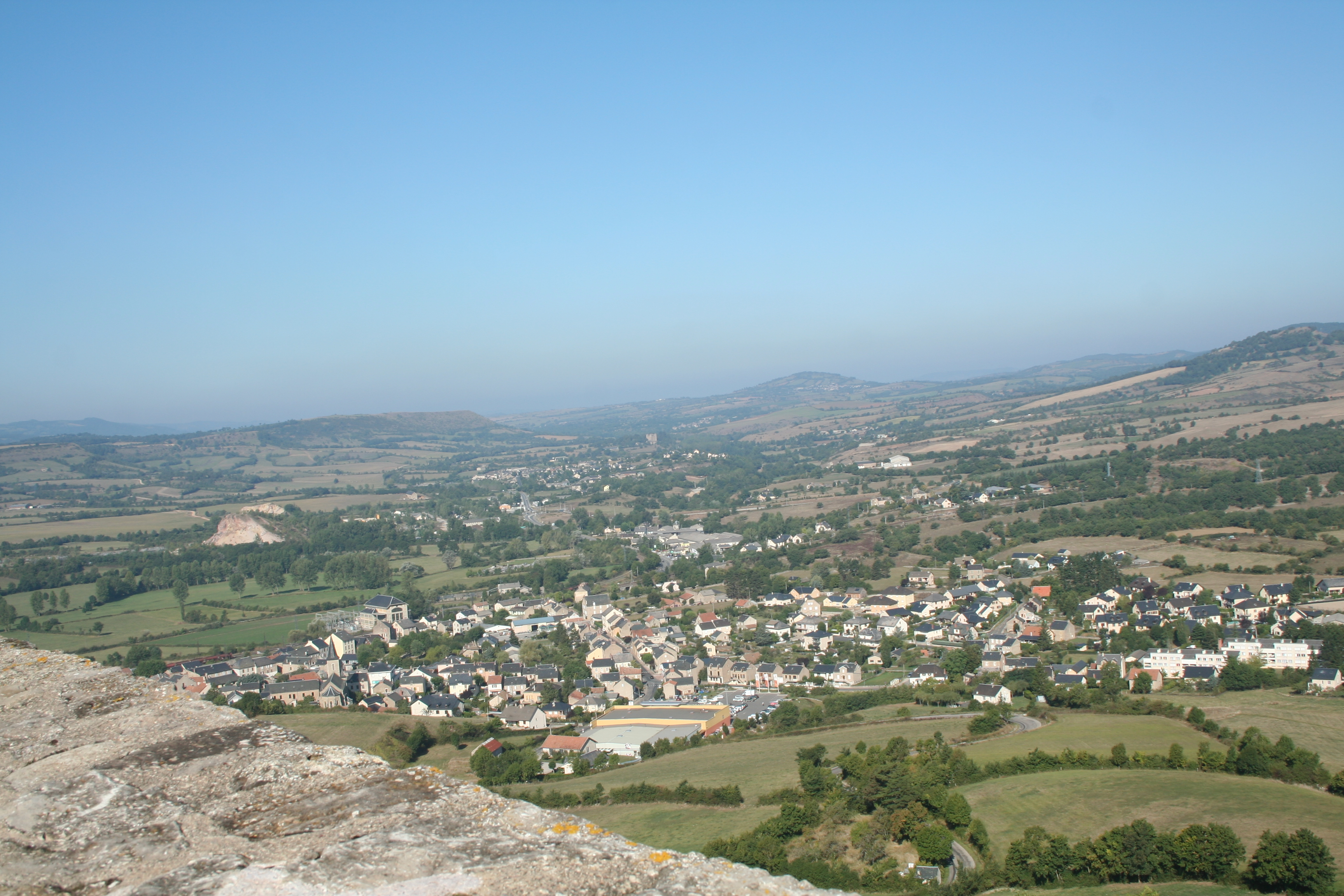 Sévérac-le-Château (Aveyron) - vue depuis le château.